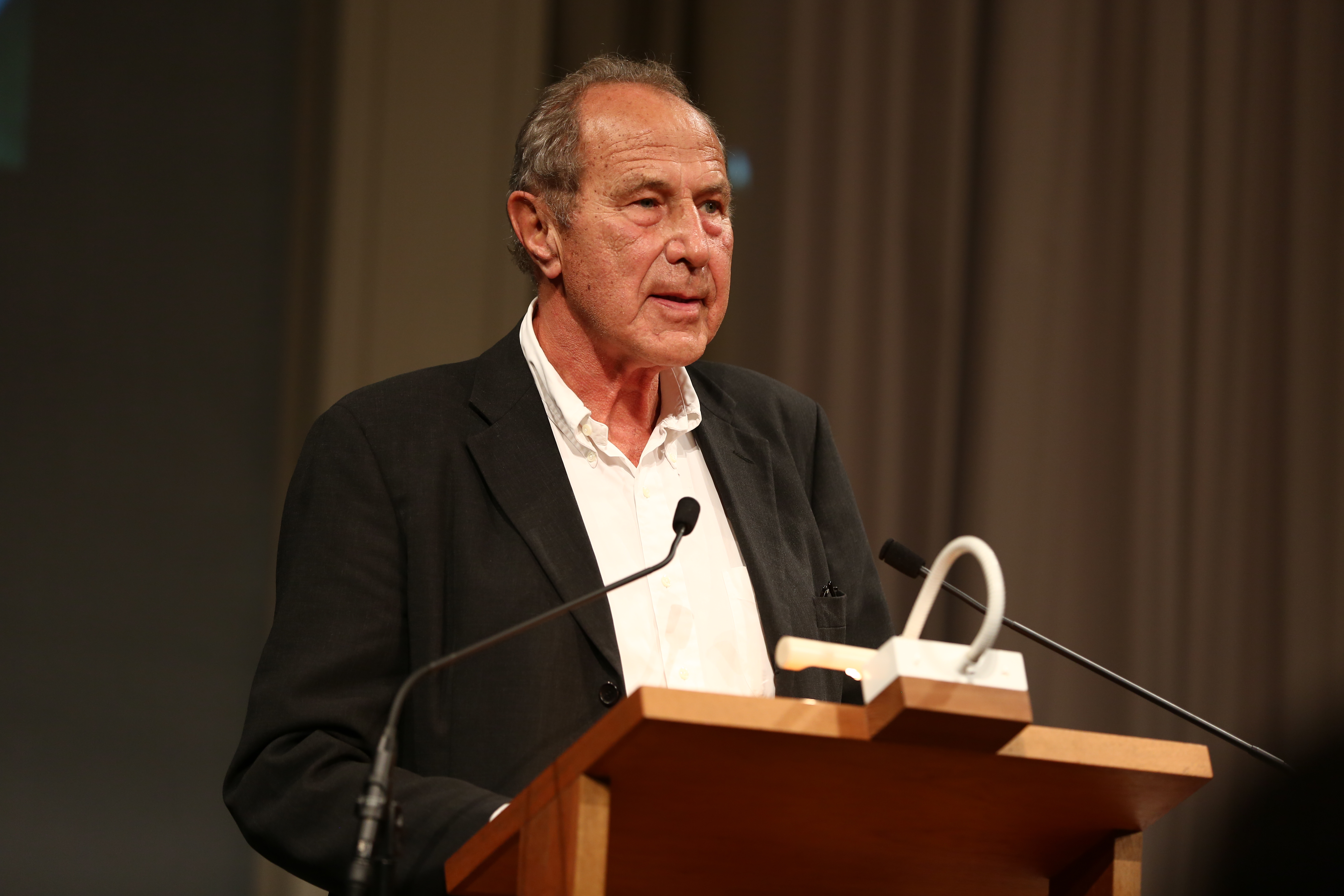 Michael Krüger, Präsident der Bayerischen Akademie der Schönen Künste Verleihung des Thomas-Mann-Preis_2017 der Hansestadt Lübeck und der Bayerischen Akademie der Schönen Künste an Brigitte Kronauer. 18. Oktober 2017 in der Münchner Residenz.